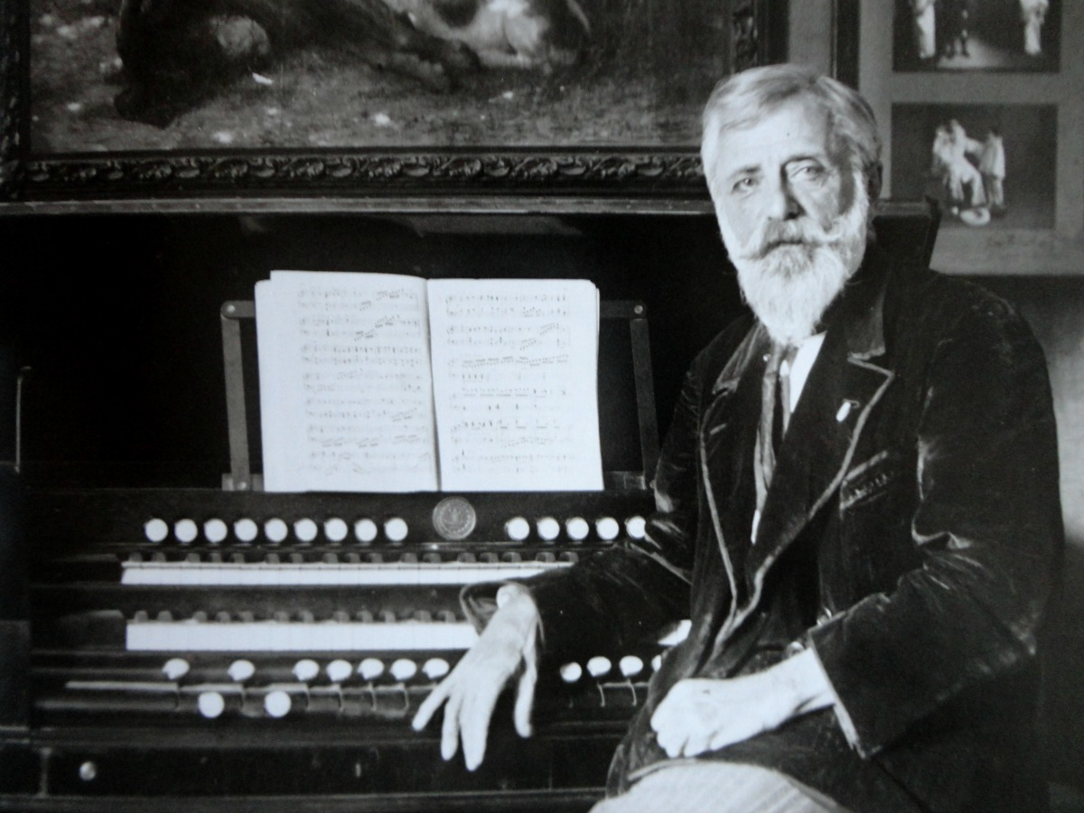 Giovanni Battista Marzuttini seduto davanti al suo organo.